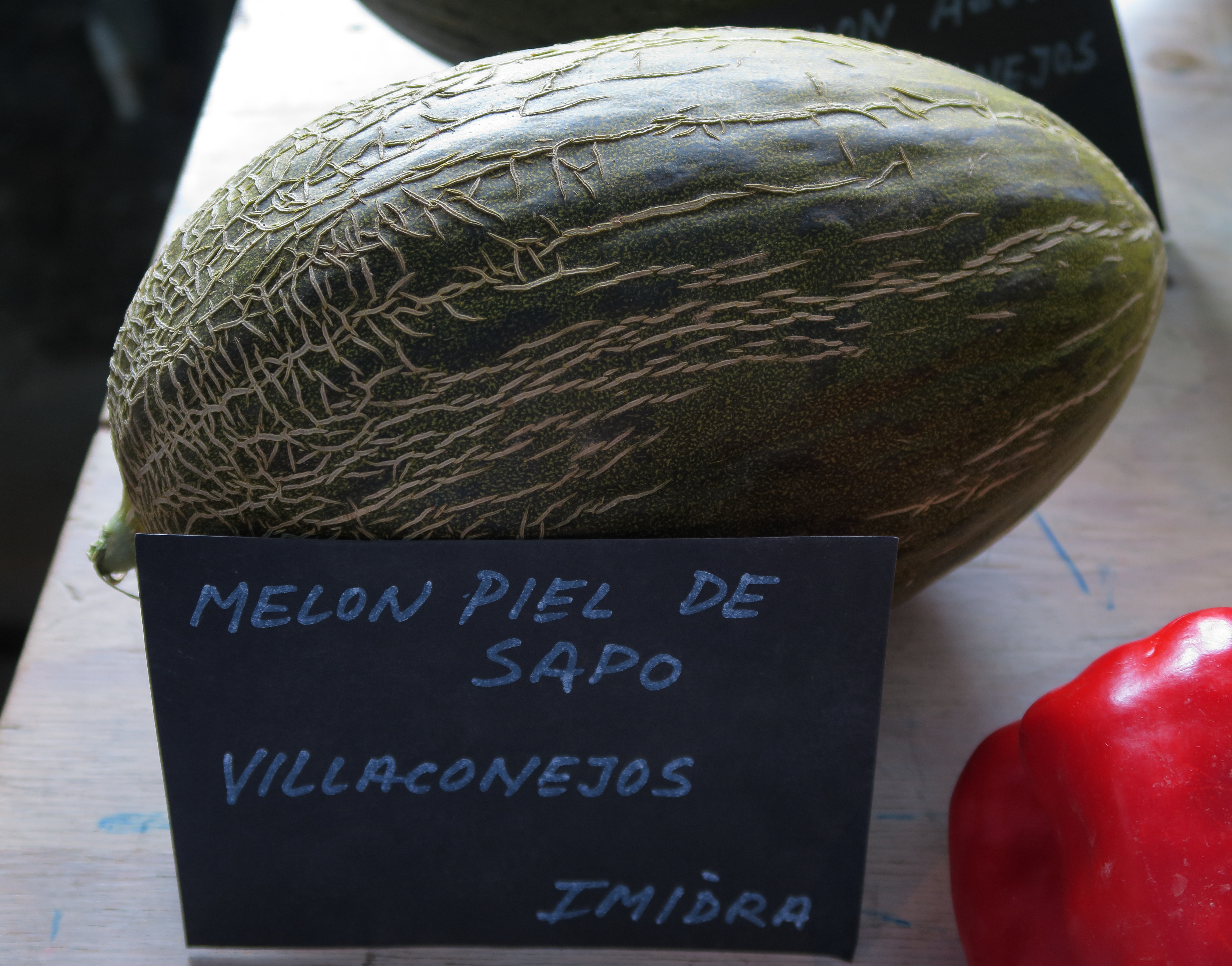 Cucumis melo, variedad "melón piel de sapo", de Villaconejos, producido por el IMIDRA (Instituto Madrileño de Investigación y Desarrollo Rural, Agrario y Alimentario)